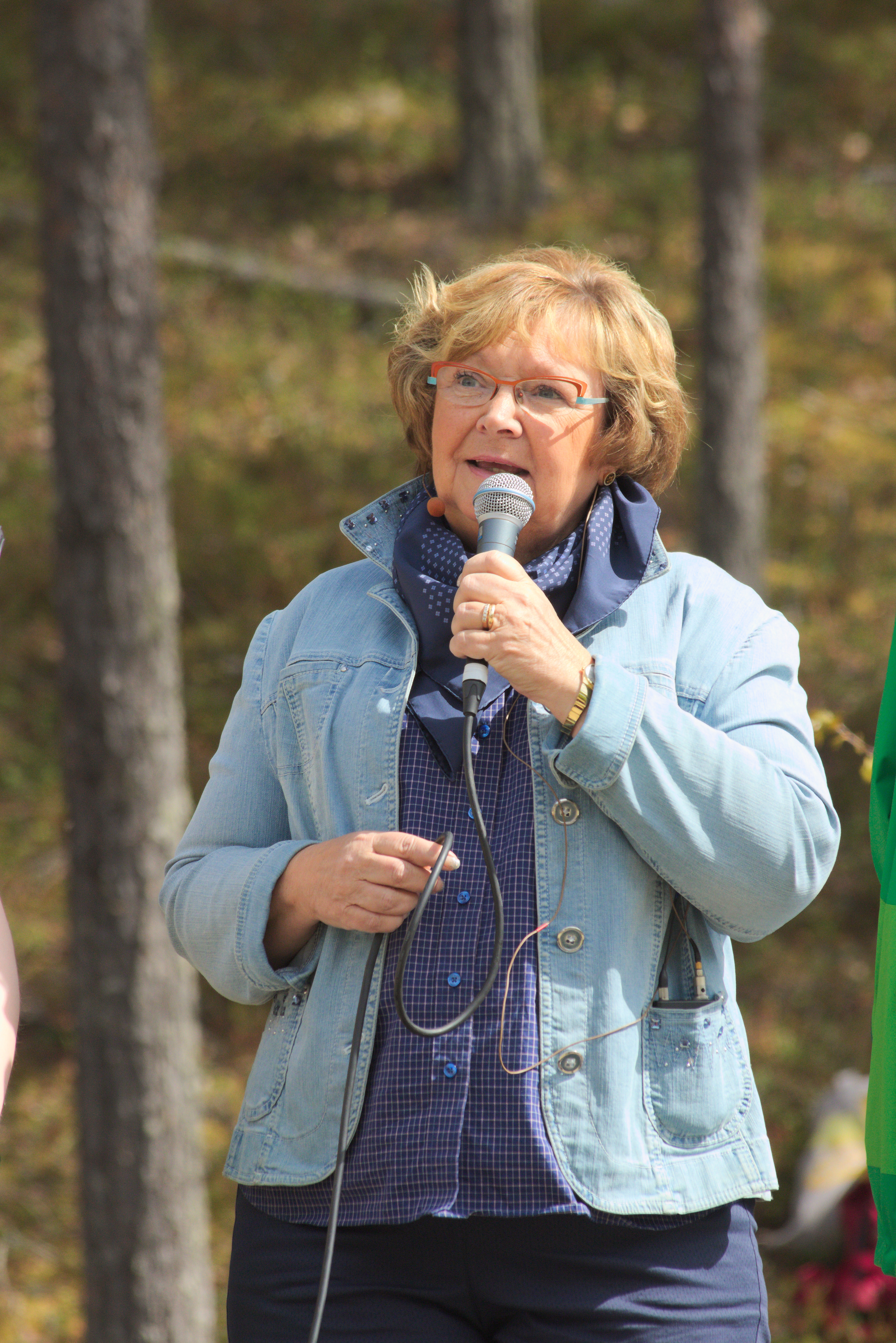 Västerbottens landshövding Magdalena Andersson under invigningen av Björnlandets utvidgade nationalpark